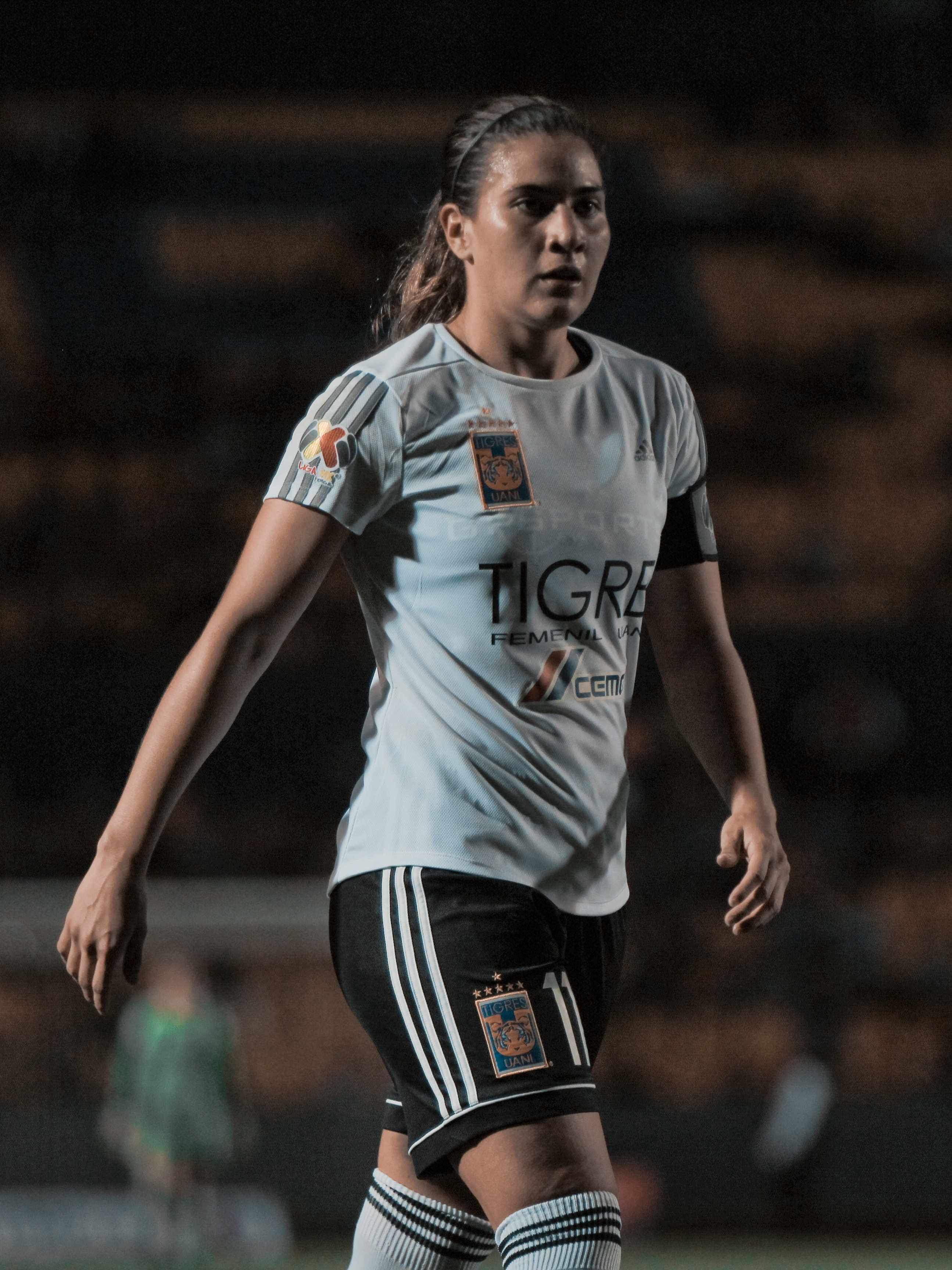 Nayeli Rangel, jugadora de futbol mexicana.